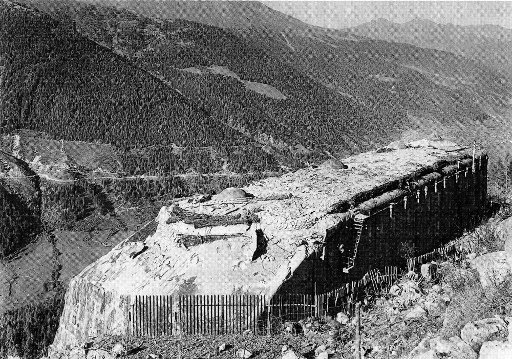 Fort Presanella-Tonale